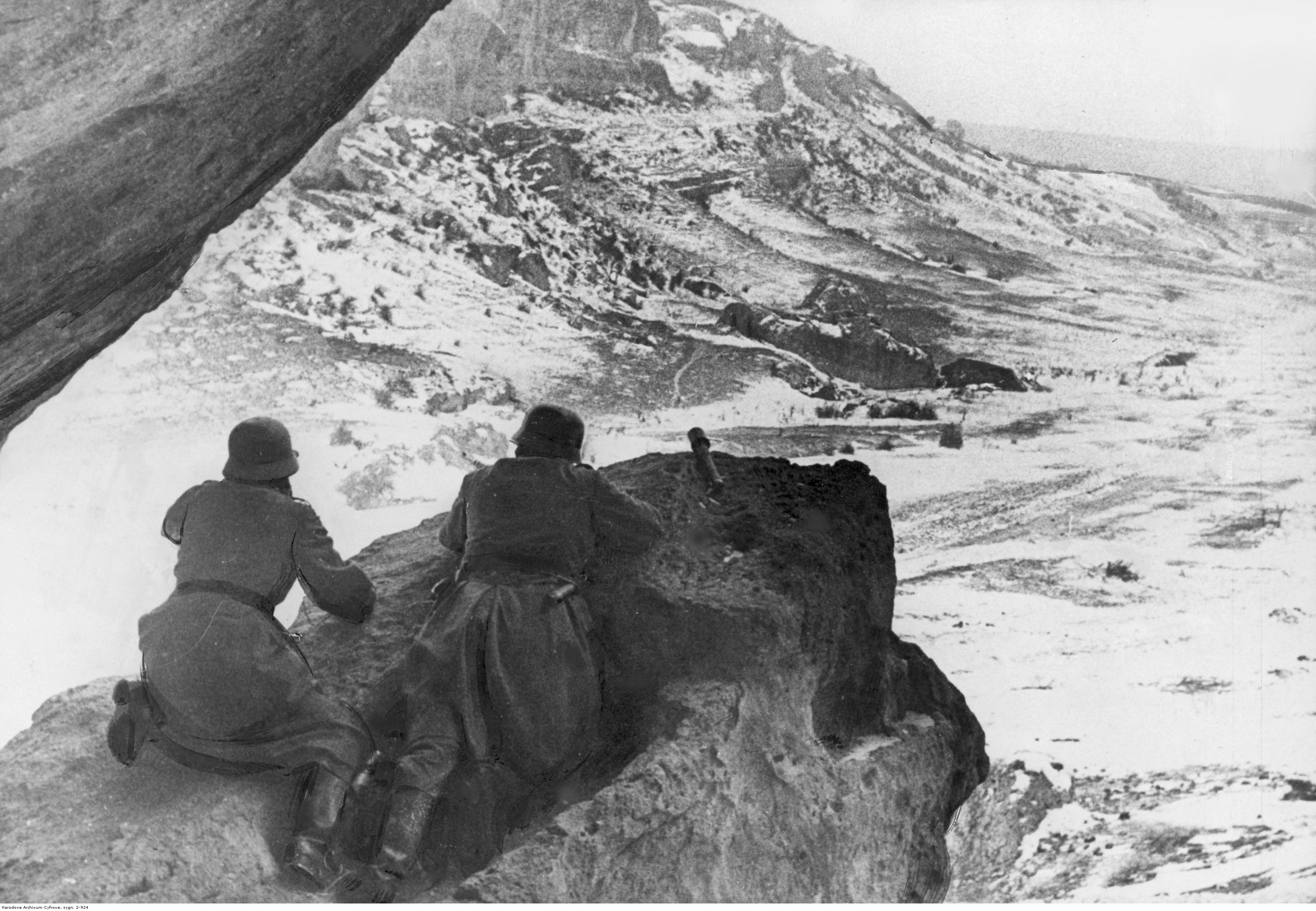 Dwóch niemieckich żołnierzy z patrolu piechoty ukrytych pod skalnym blokiem.